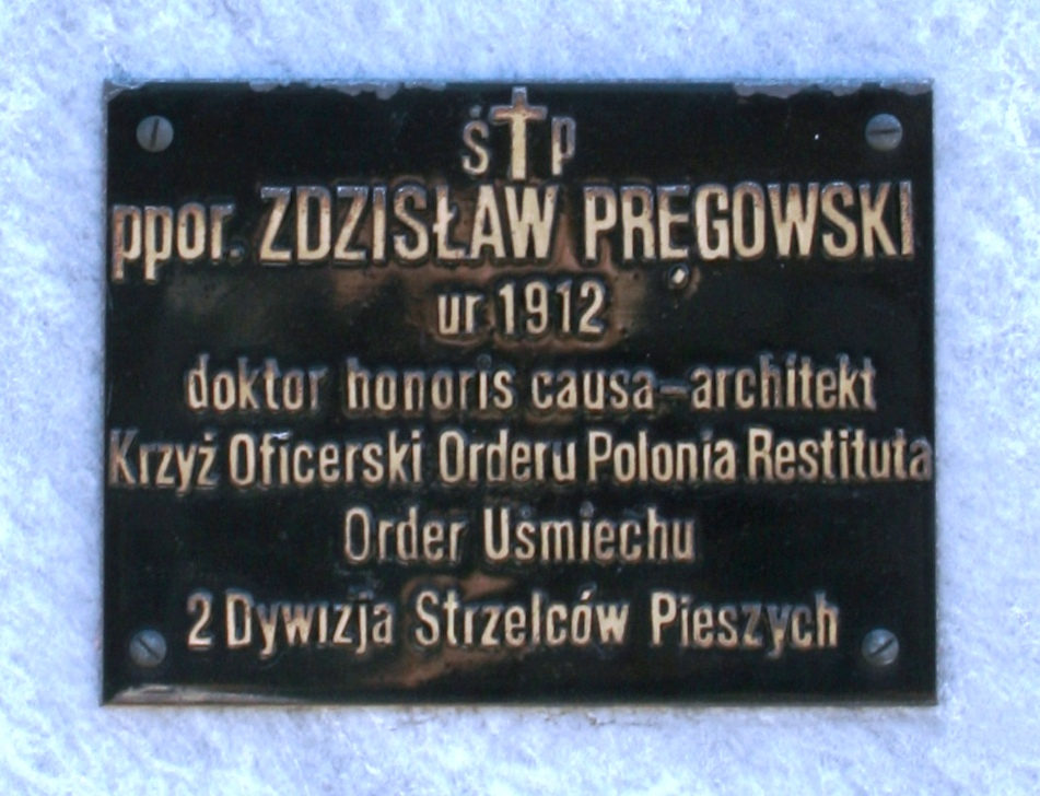 Kwatera I Samodzielnej Brygady Spadochronowej na Powązkach Wojskowych w Warszawie. Uhonorowany ppor. Zdzisław Pręgowski